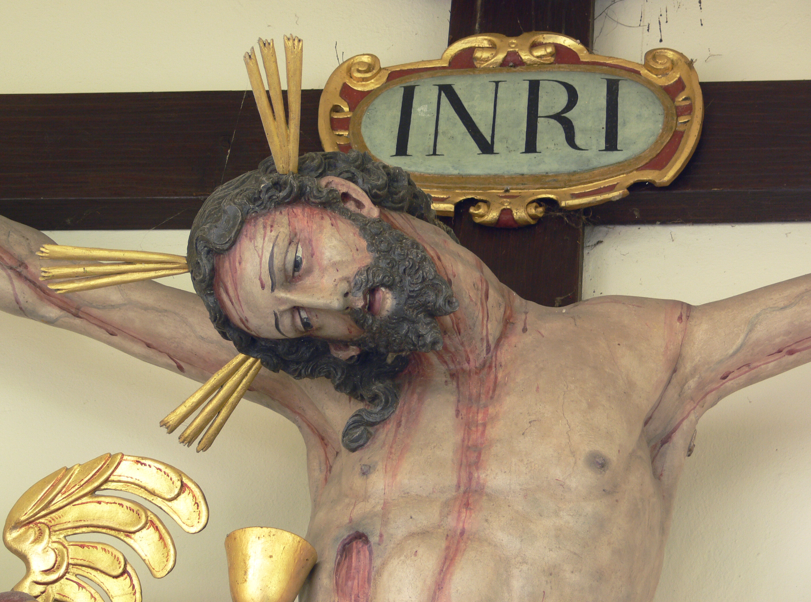 Brochenzell, Gemeinde Meckenbeuren, Bodenseekreis Heilig-Kreuz-Kapelle Kreuzigungsgruppe (ca. 1625–1650): Kruzifix, Detail